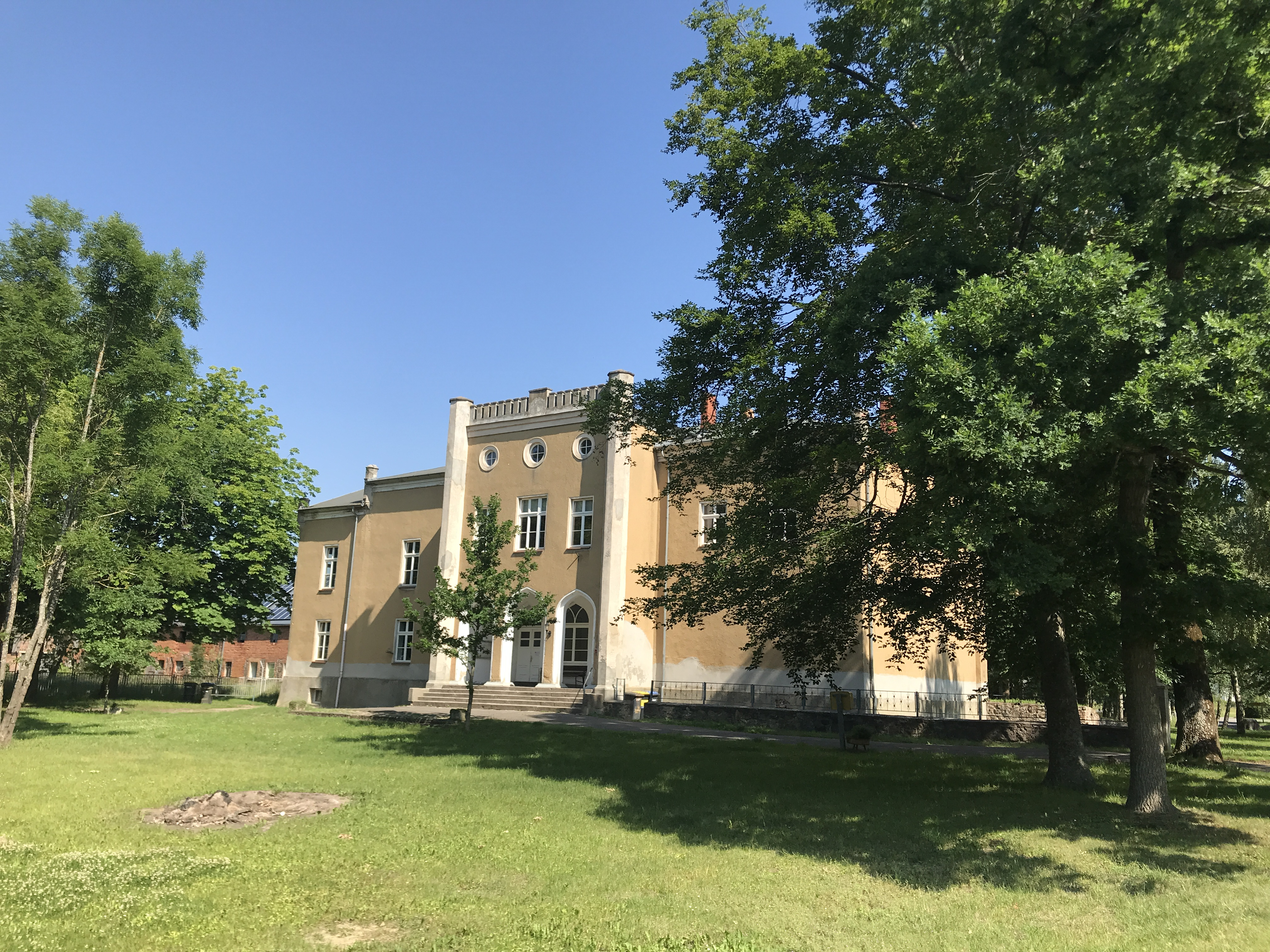 Güterberg, ein Ortsteil der Gemeinde Uckerland in Brandenburg